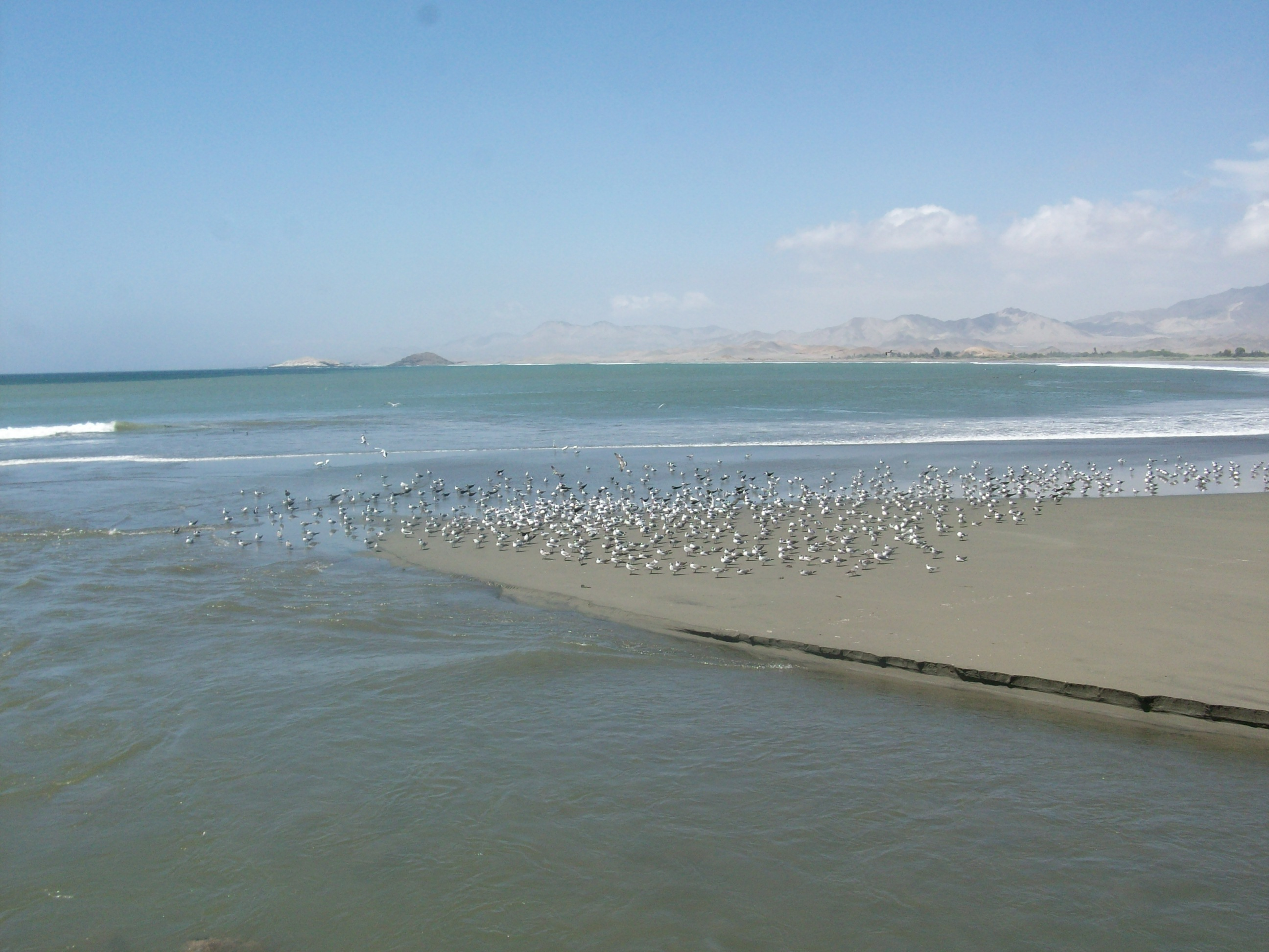 Gaviotas o aves marinas en las orillas del mar en Puerto Huarmey, Ancash, Perú.